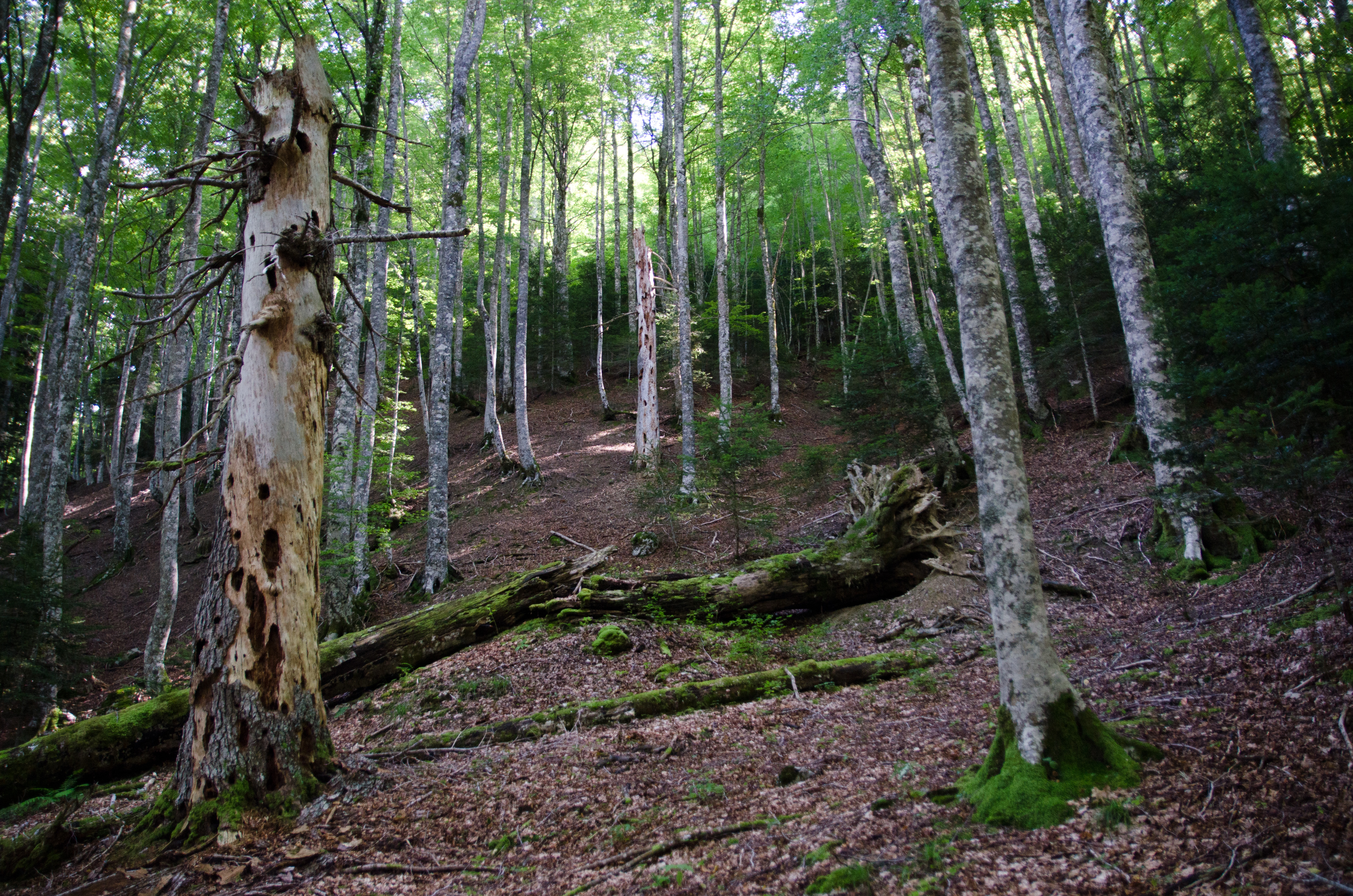 Interior del hayedo abetal de Larra-Aztaparreta This is a photography of a Special Area of Conservation in Spain with the ID: ES0000123. Natura2000 entry, EEA entry